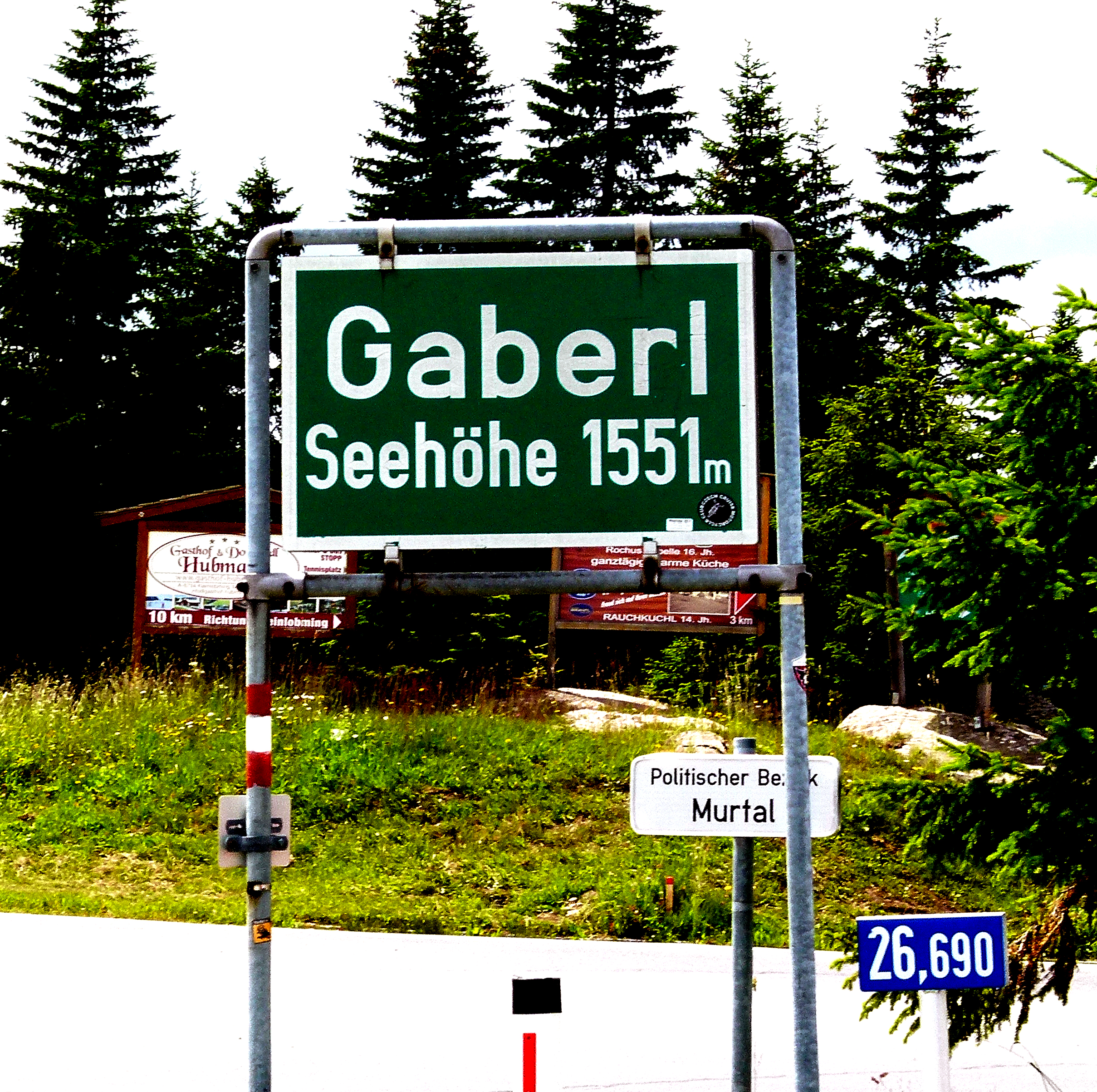 Gaberl-hágót jelző tábla